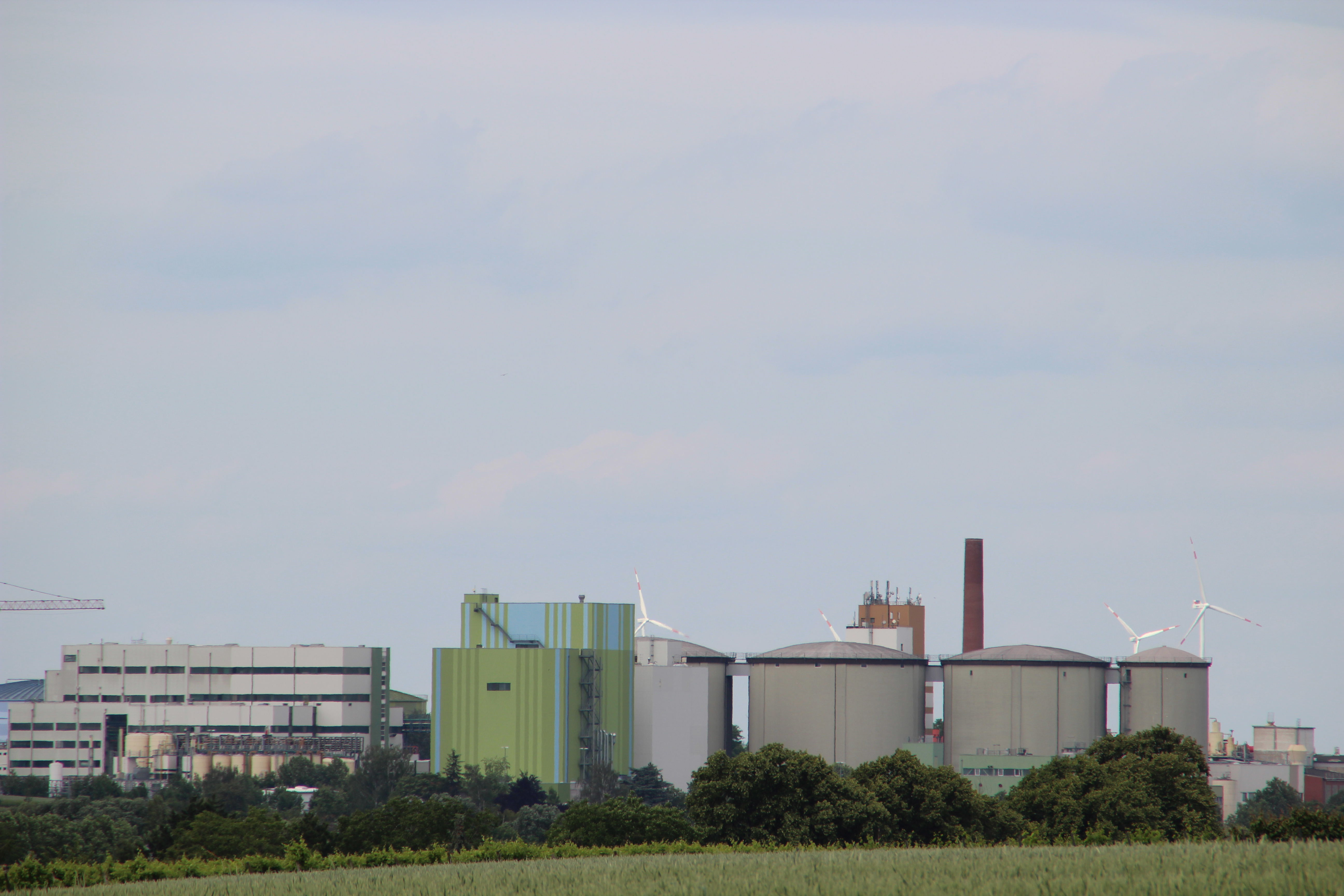 Zuckerfabrik in Offstein